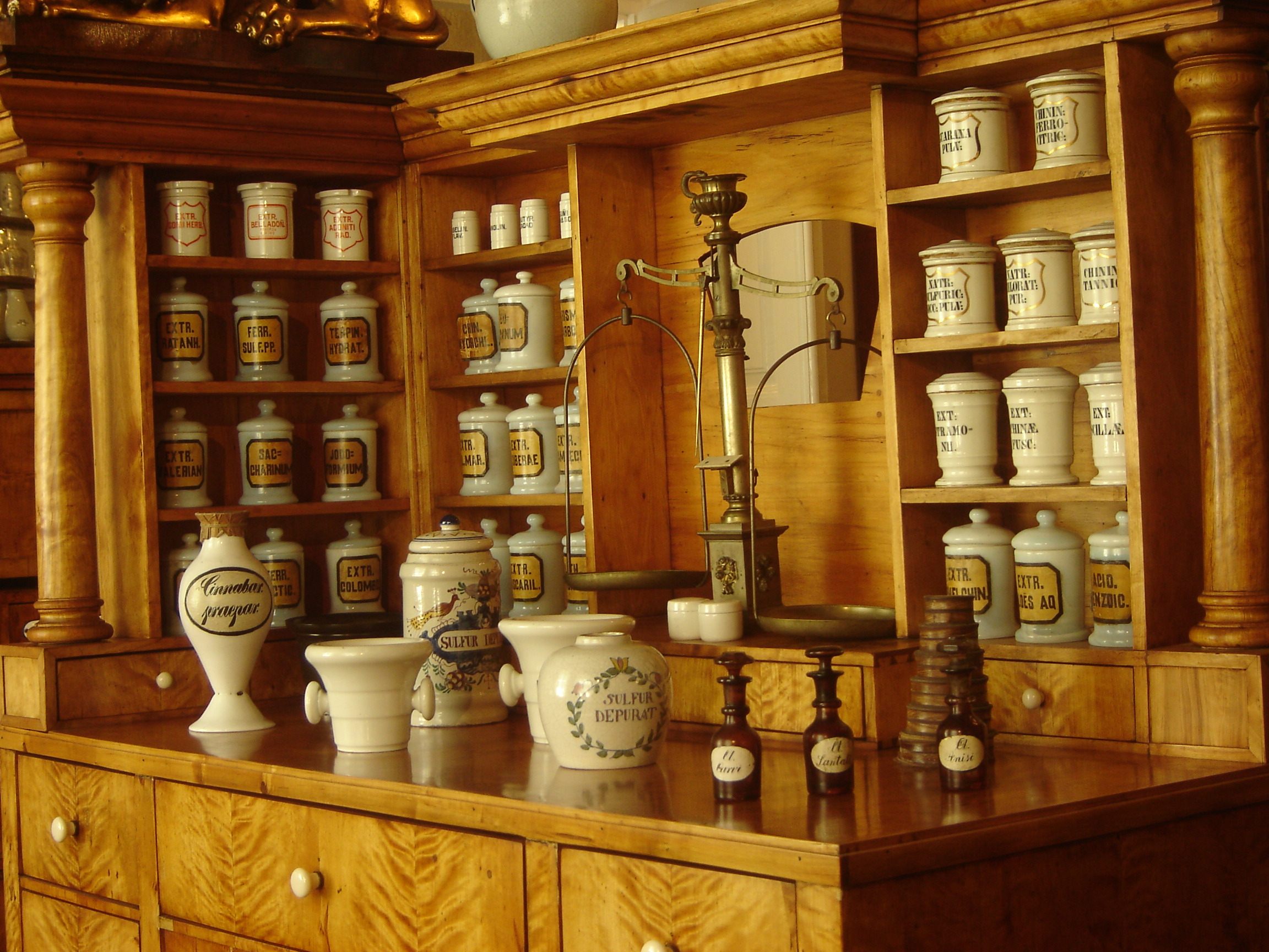 Kraków, Poland / Pharmacy Museum